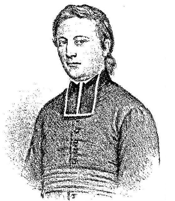 Portrait de l'abbé Albert Lecomte, directeur de l'Institution Libre du Sacré-Coeur (1838-1855)